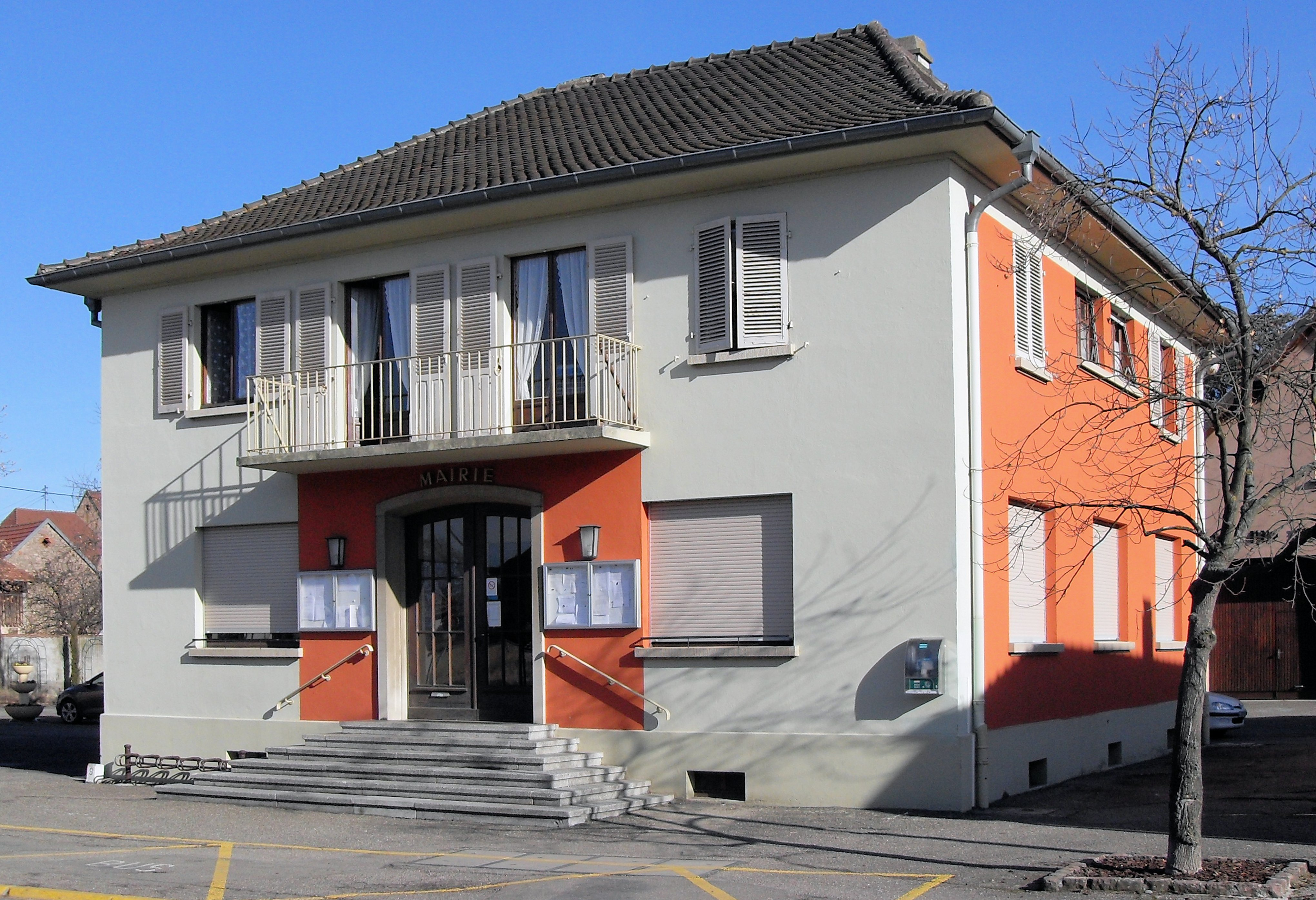 La mairie de Meyenheim